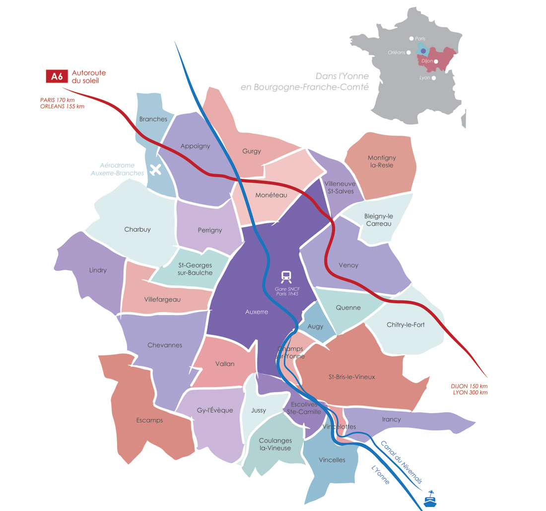 Communes de la Communauté de l'Auxerrois